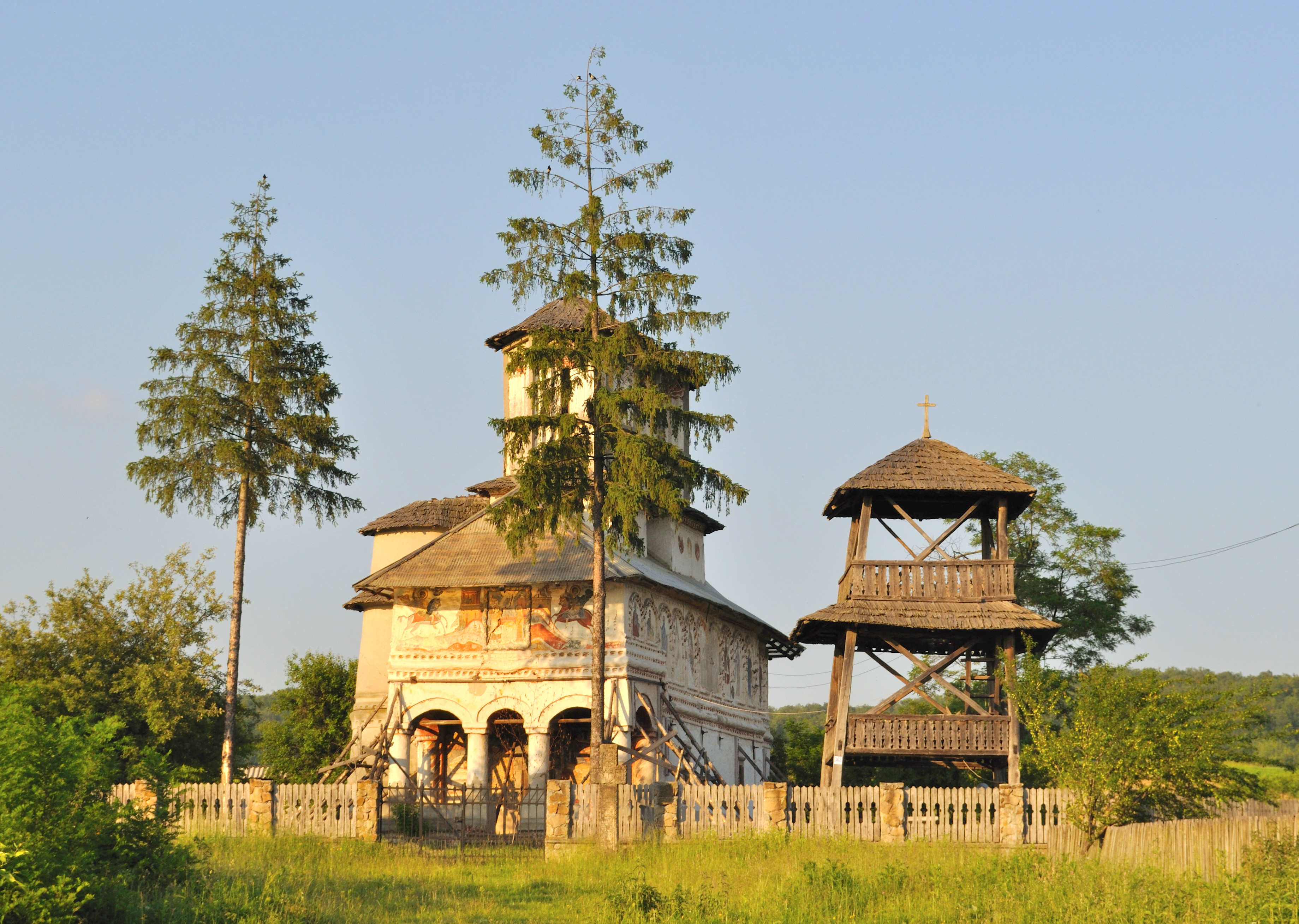 Biserica monument „Buna Vestire” (1804), Copăceni, Vâlcea, dincolo de apa Cernei